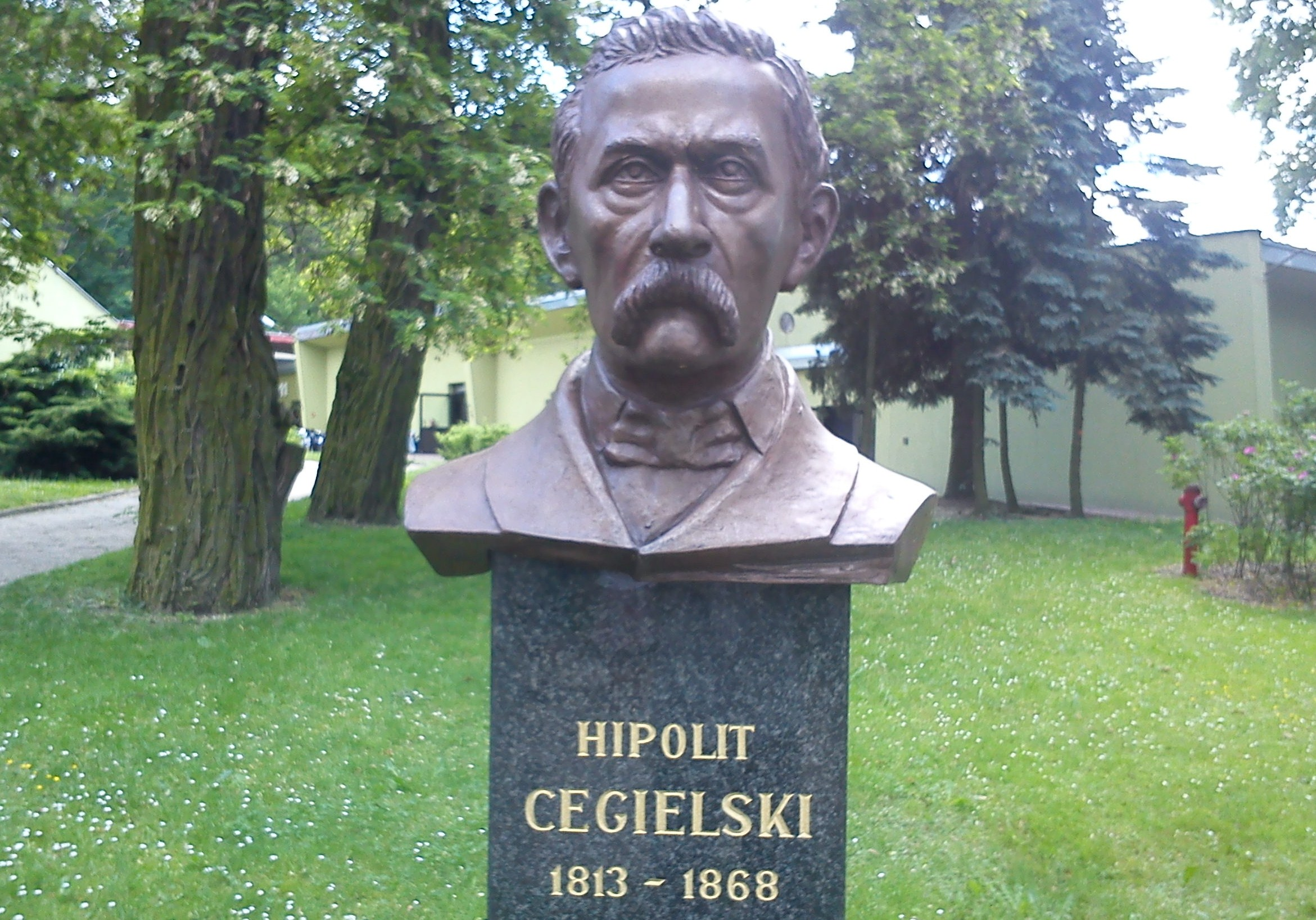 Szreniawa - pomnik Hipolita Cegielskiego w parku pałacowym przy Muzeum Rolnictwa (zabytek nr 1804/A).